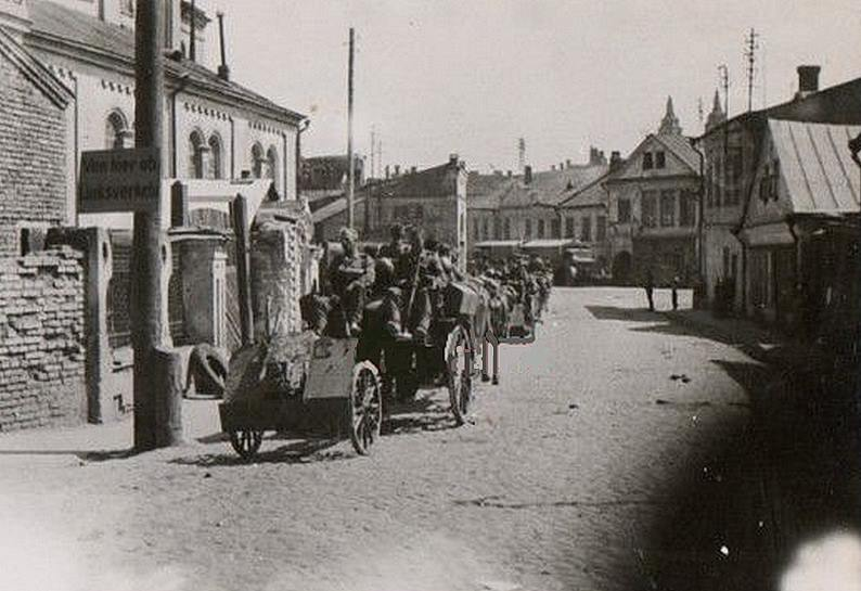 Беларуская (тарашкевіца): Менск (Miensk), вуліца Ракаўская (vulica Rakaŭskaja) у бок Нямігі (vulica Niamiha)